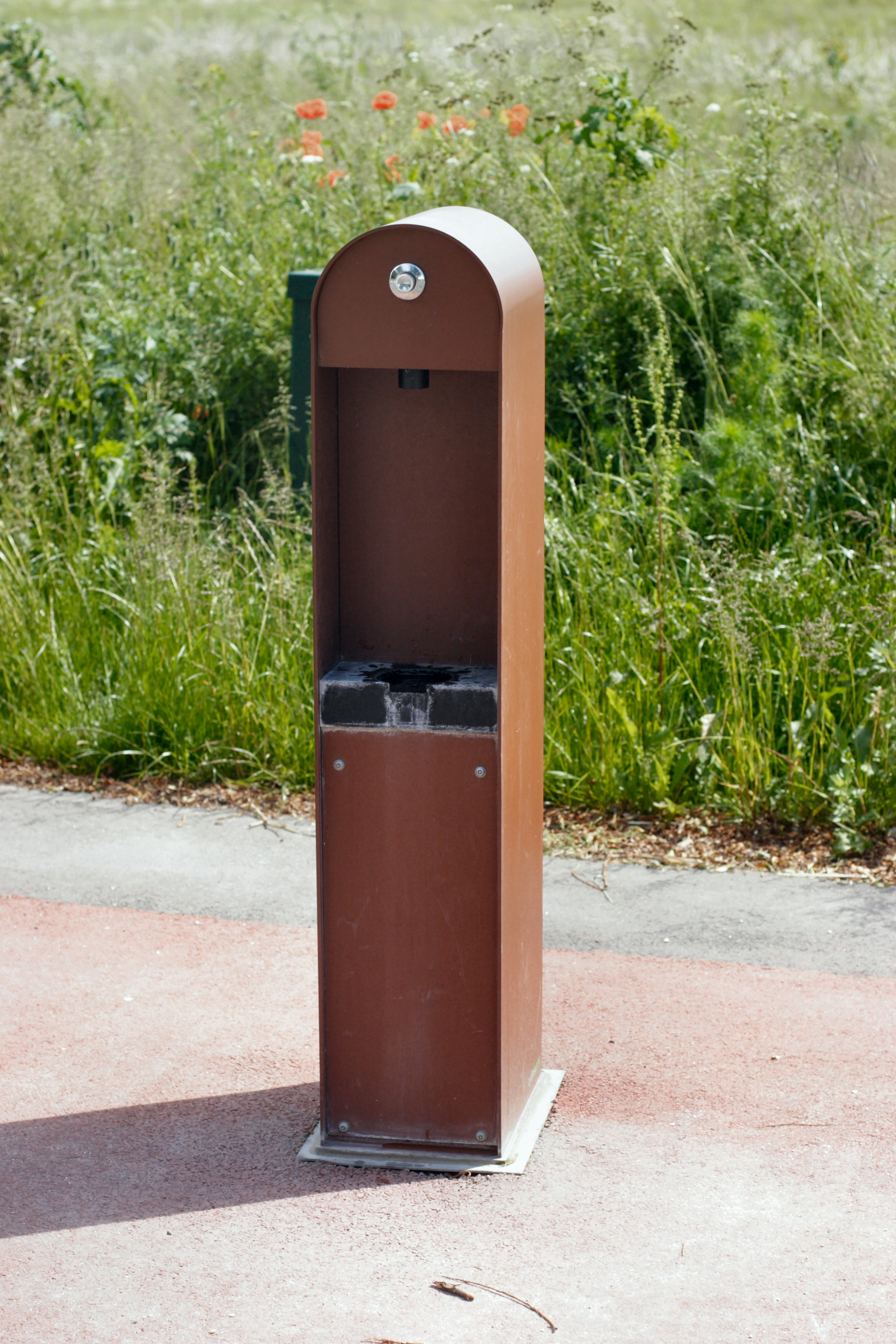 Parker og cykel terminal i Lystrup